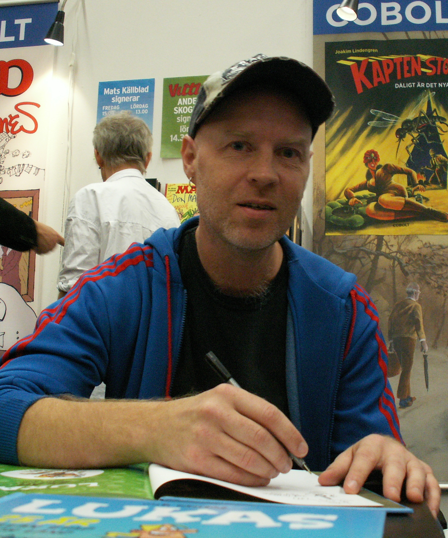 Mats Källblad på Bokmässan i Göteborg.